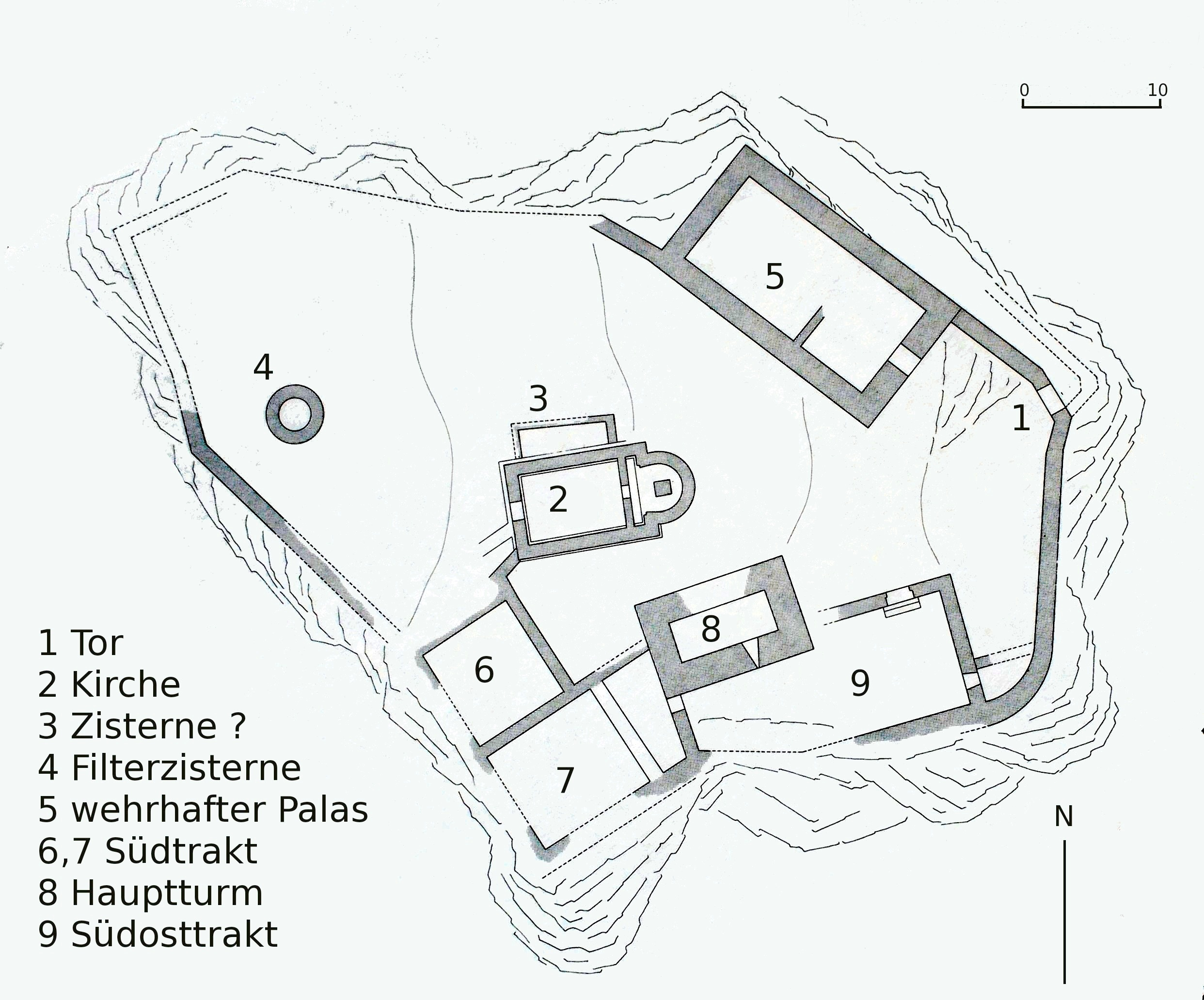 Ruine von Sogn Parcazi; Übersicht